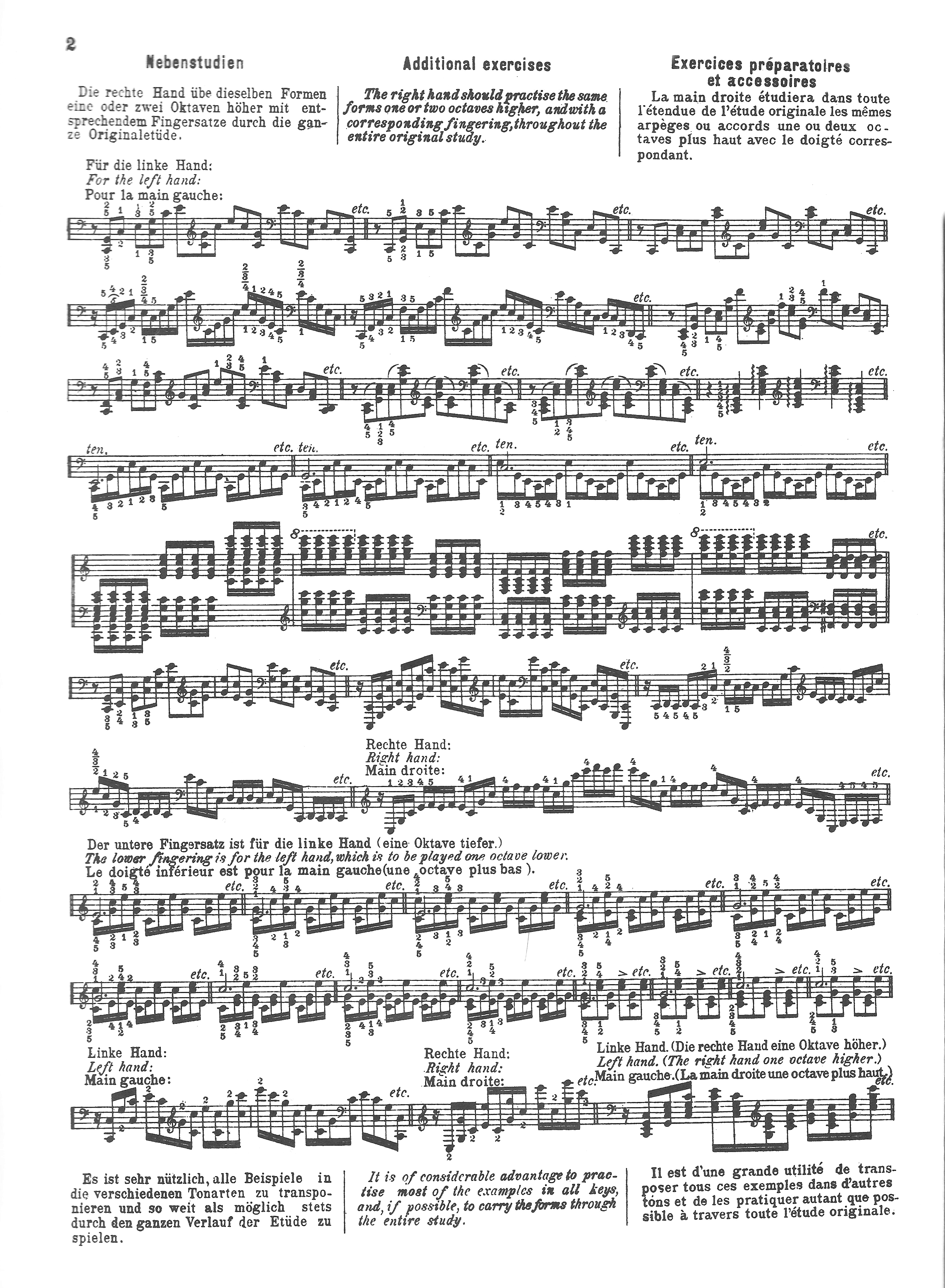 Scan einer Seite aus Leopold Godowskys Studien zu Chopins Etüden. Die Nebenstudien dienen der pianistischen Einarbeitung und zeigen die enorme Schwierigkeit und Vielfalt der Etüden und ihrer Bearbeitungen.